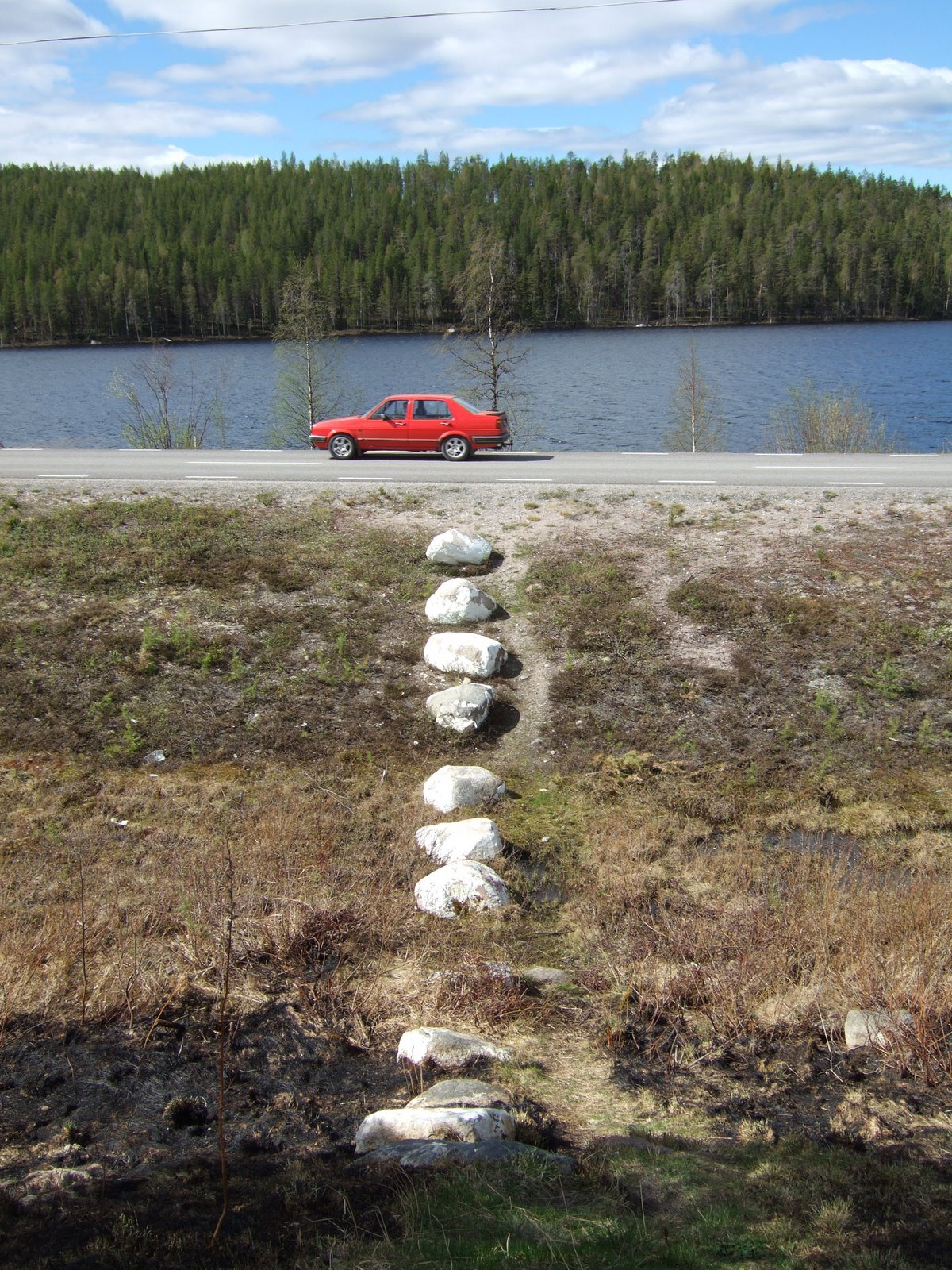 Die witte stenen stellen de poolcircel voor en loopt rond de hele wereld. Dat is best wel veel werk geweest.